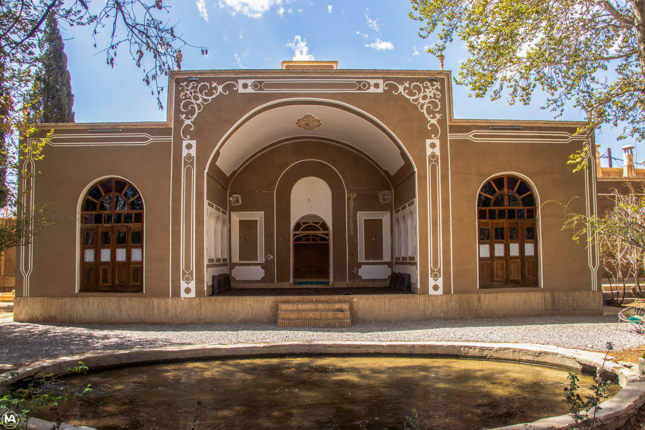 آب قنات حسن آباد مشیر از جلوی این عمارت عبور می کند که باعث ایجاد هوای دلچسب و مطبوع می شود. تابستان ها این عمارت به دلیل هوای خنک بیشتر مورد استفاده قرار می گرفته است.